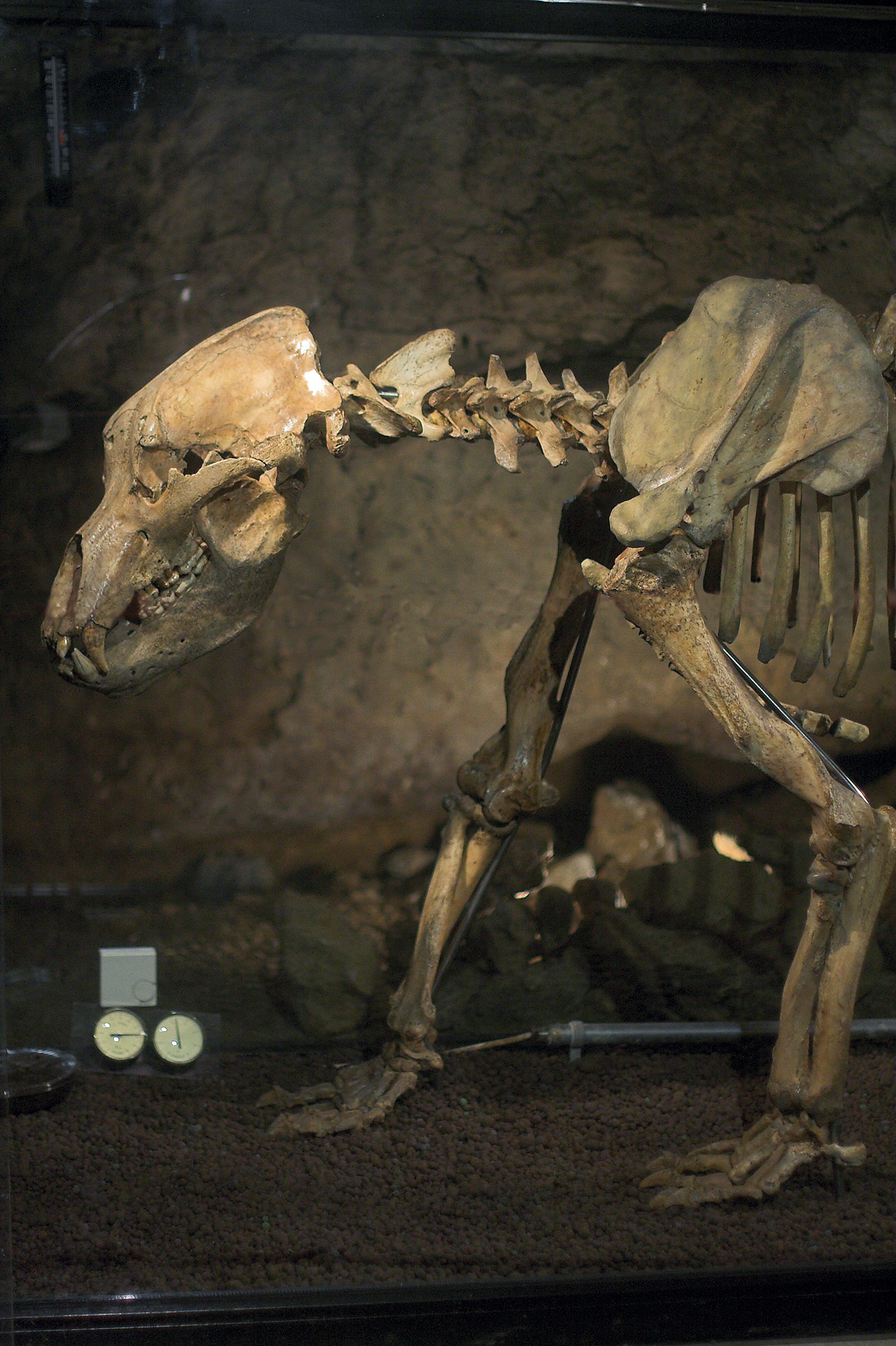 Heinrichshöhle Hemer Sundwig, Skelett eines Höhlenbären - Fotograf: Timo Sack